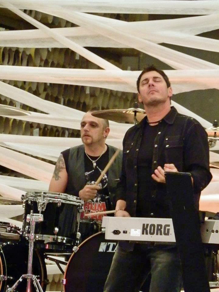 Johnny Gioeli durante le riprese del video di 'Fever Dreams'